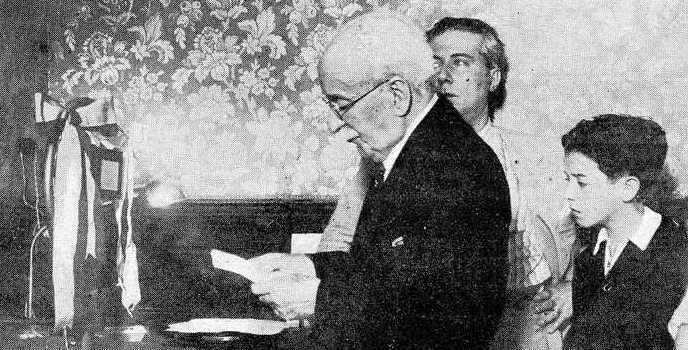 Ricardo Conde Salgado na inauguración da emisión do programa de radio La Hora Gallega de Radio Patria de Buenos Aires, 1933. fotografía en Vida Gallega